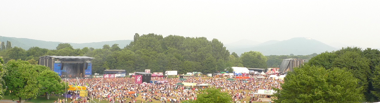 Rheinkultur 2010 in der Bonner Rheinaue